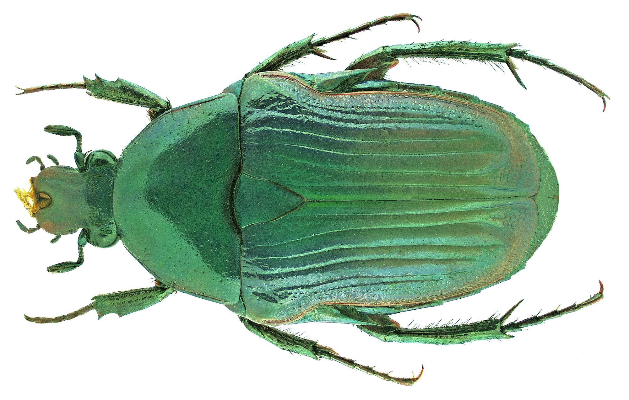 Familie: Scarabaeidae Groesse: 21 mm Fundort: Madagascar, Anosibe, 1971 det. U.Schmidt Foto: U.Schmidt, 2006